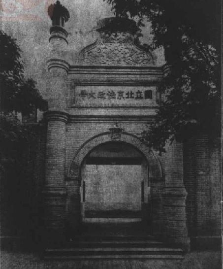 题名： 国立北京法政大学第三院前门:[照片] 文献来源： 《法政学报(北京1918)》 出版时间： 1926 年 卷期(页)： [ 第5卷 第1/2期 ，1页 ] 中图分类号： D909.2